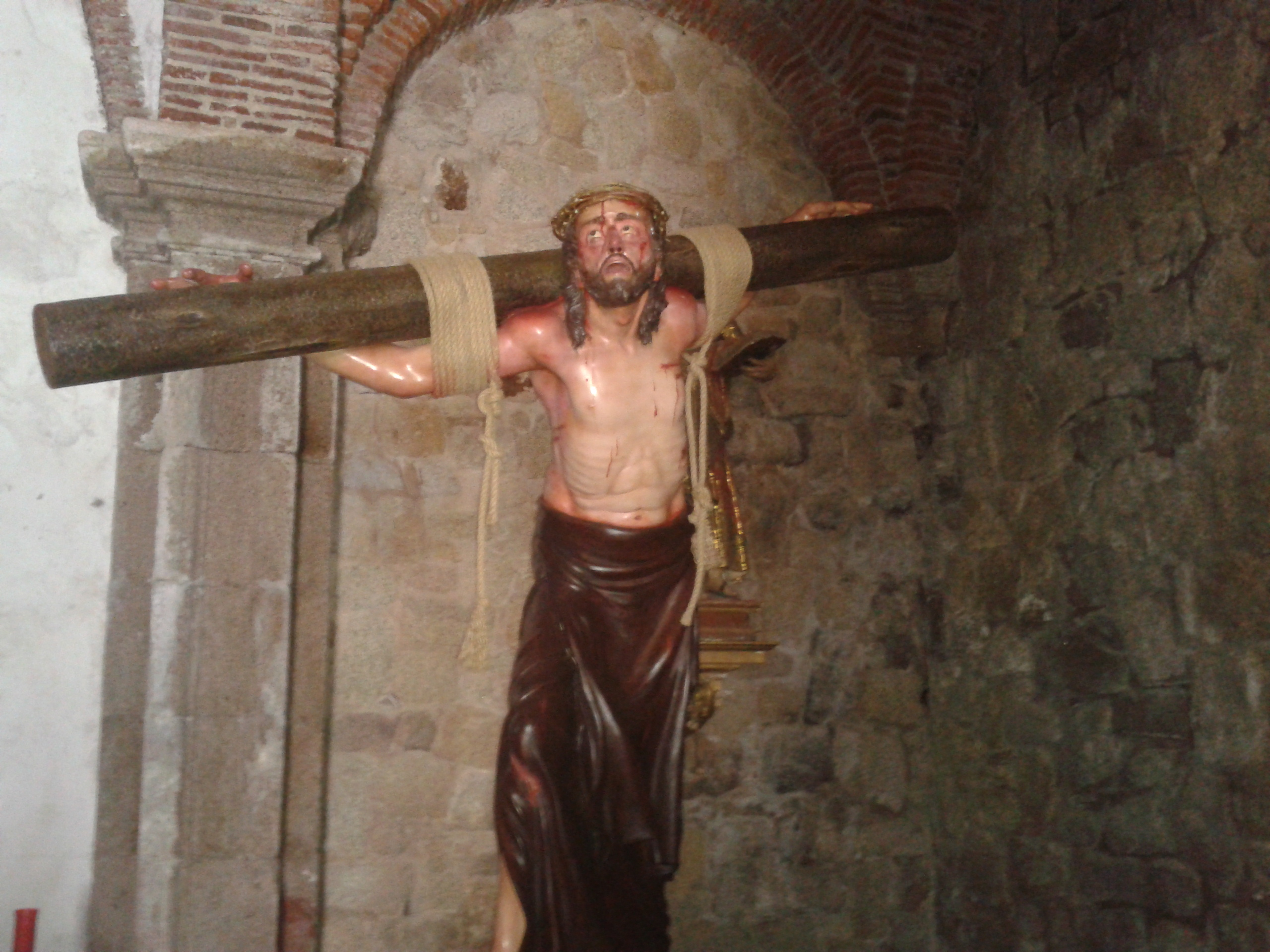 Imagen de Jesus Condenado en la Ermita de la Paz.